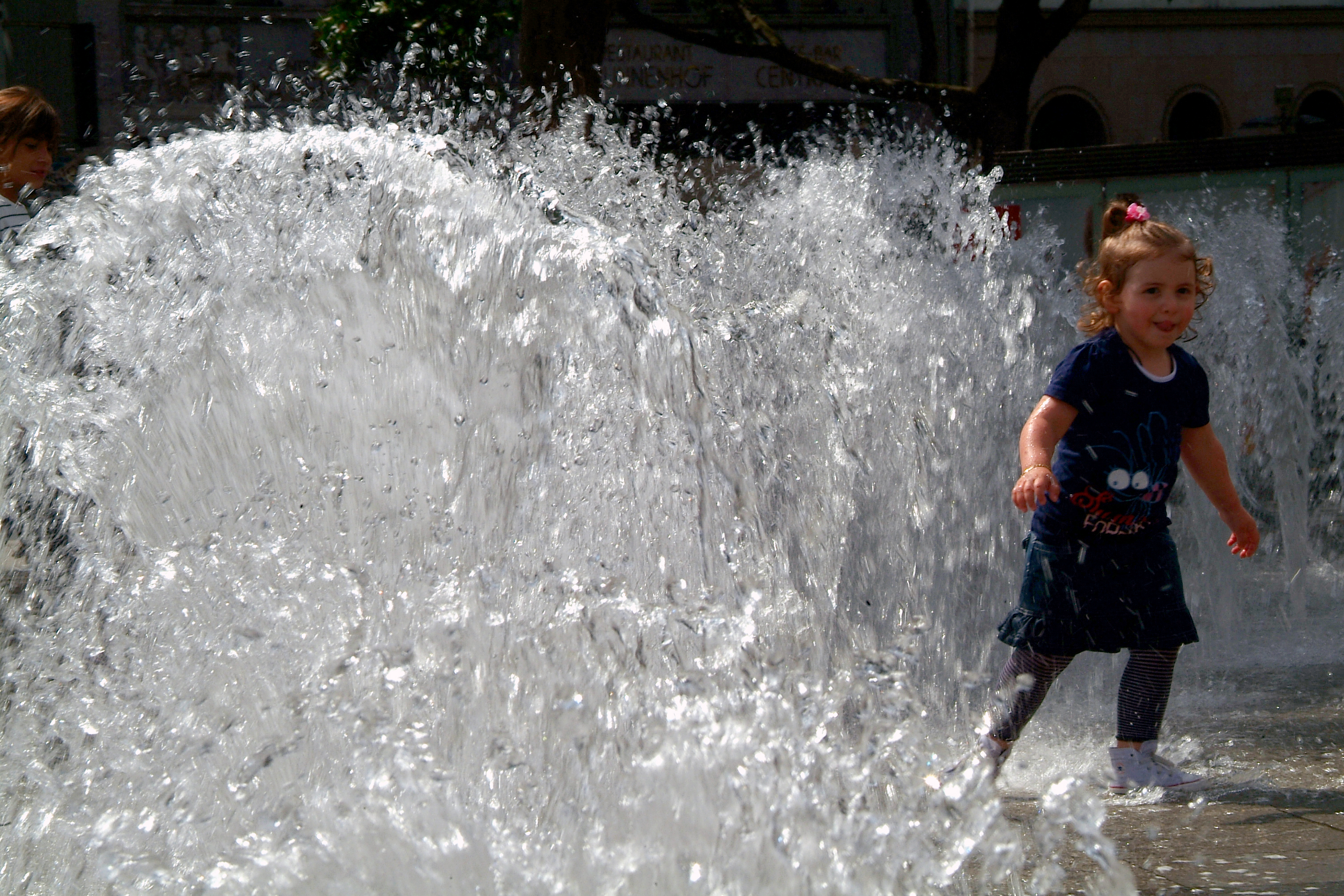 Der HAZ-Brunnen auf dem Ernst-August-Platz vor dem Hauptbahnhof Hannover besteht aus zwei sichelförmigen, ebenerdigen Brunnen vor den Parktaschen beiderseits des Ernst-August-Denkmals ...